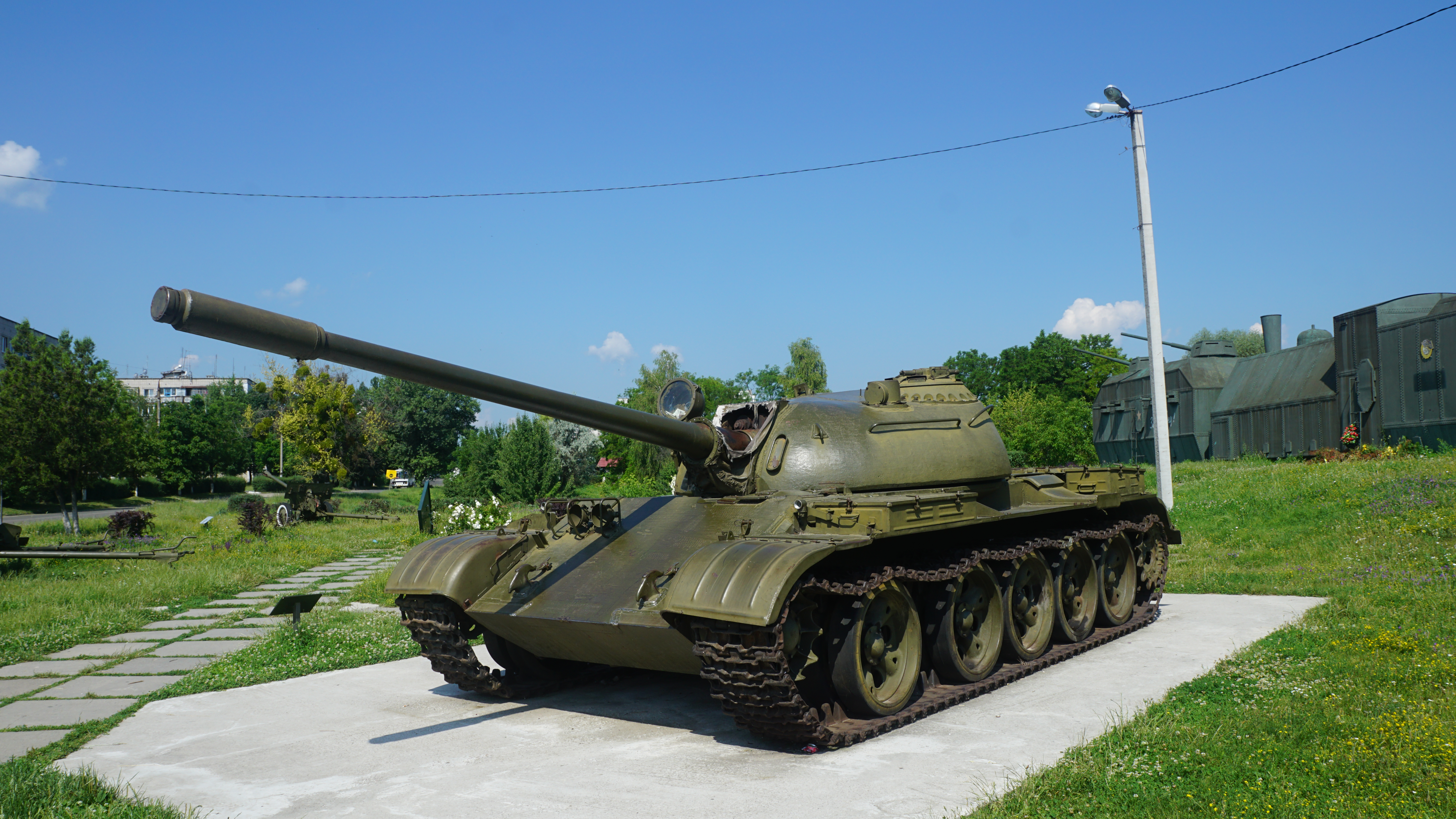 в Музеї військової техніки під відкритим небом в місті Канів.